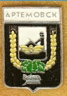 Значек.Артемовск